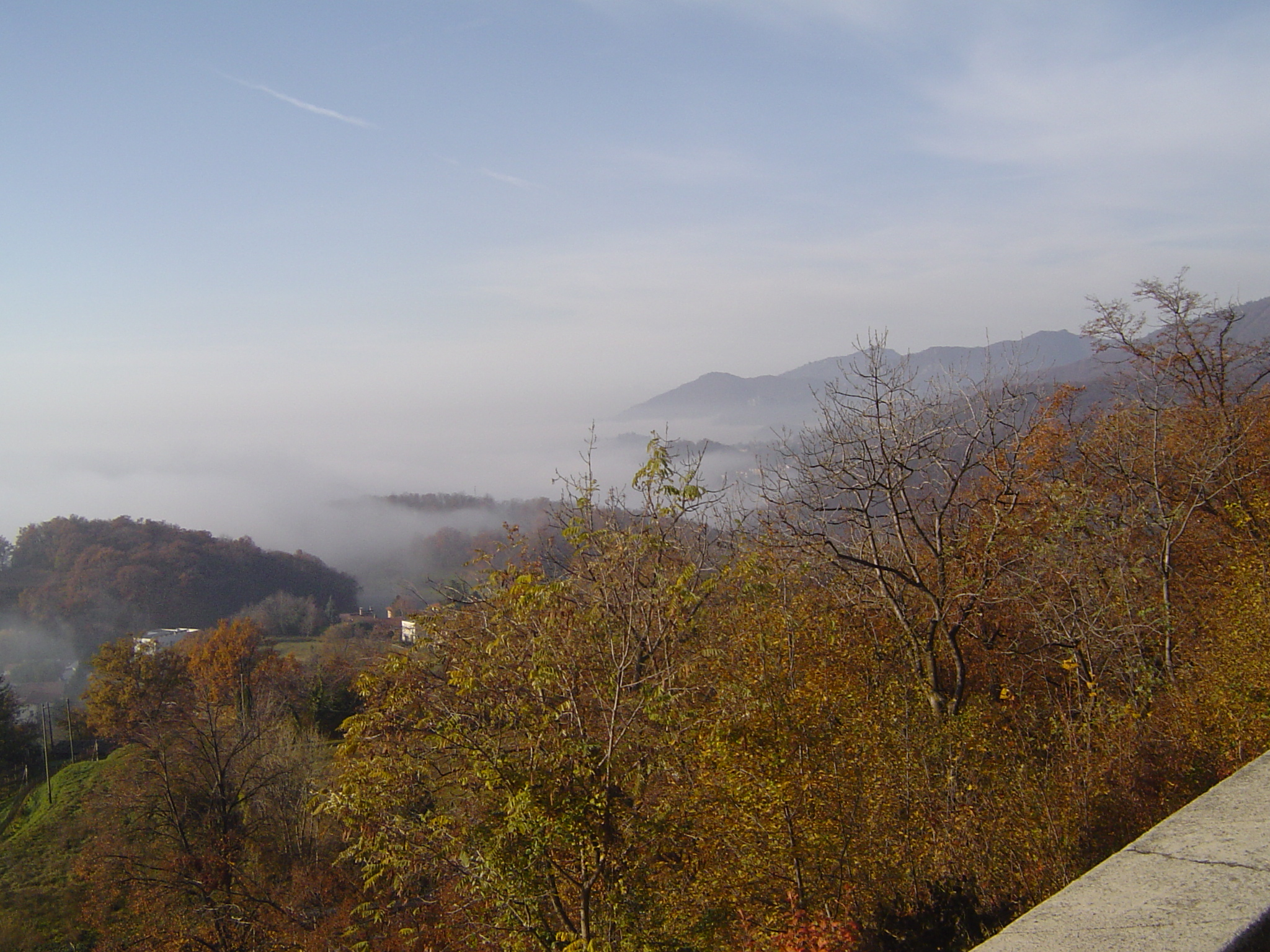 Panorama dalla chiesa di Sant'Agata di Tremona